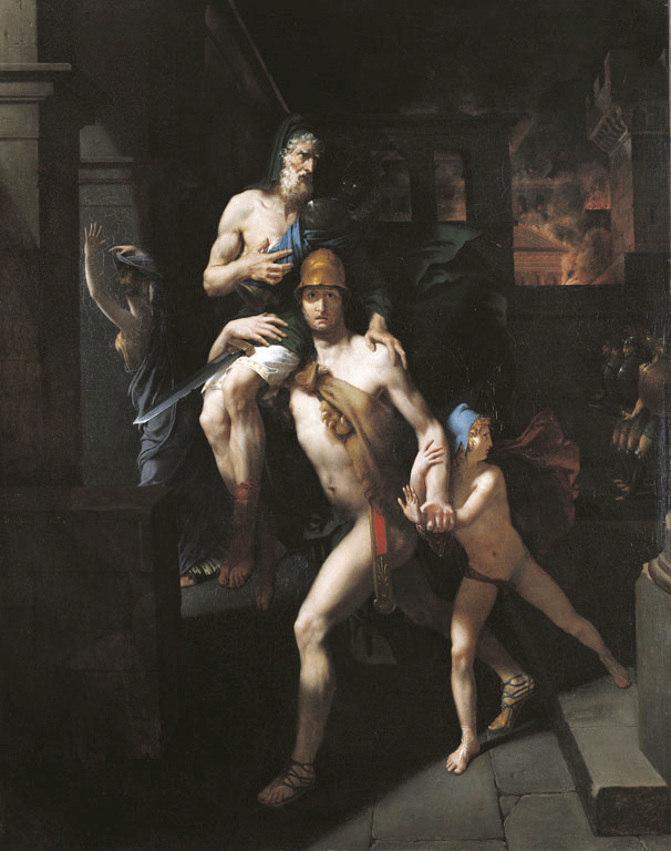 Merry-Joseph Blondel, Enée portant son père Anchise, 1803, Paris, École nationale supérieure des beaux-arts.